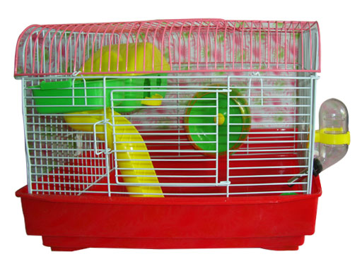 Chuồng nuôi minh họa